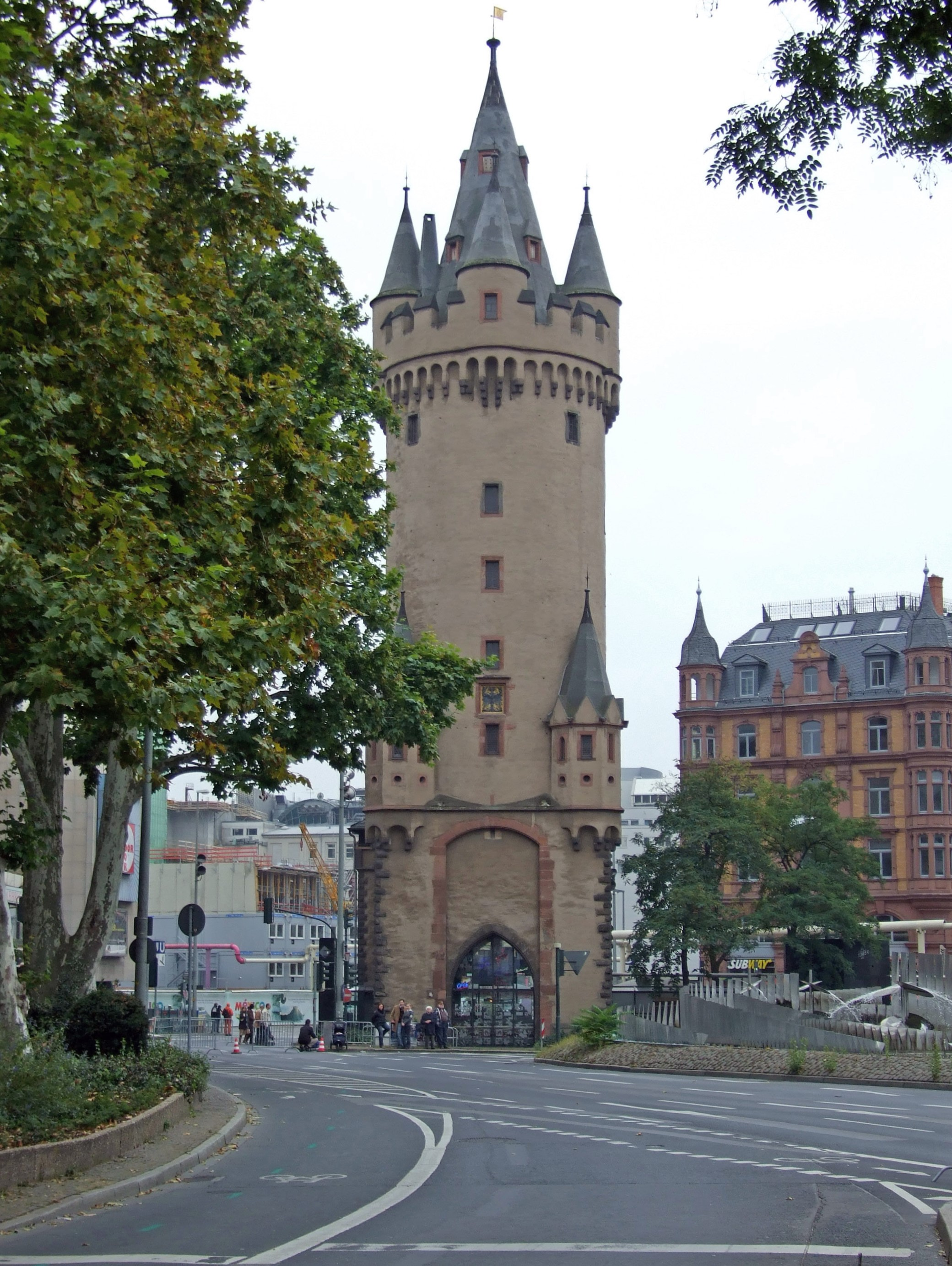 Eschenheimer Turm (Nordseite), 2007 in Ffm